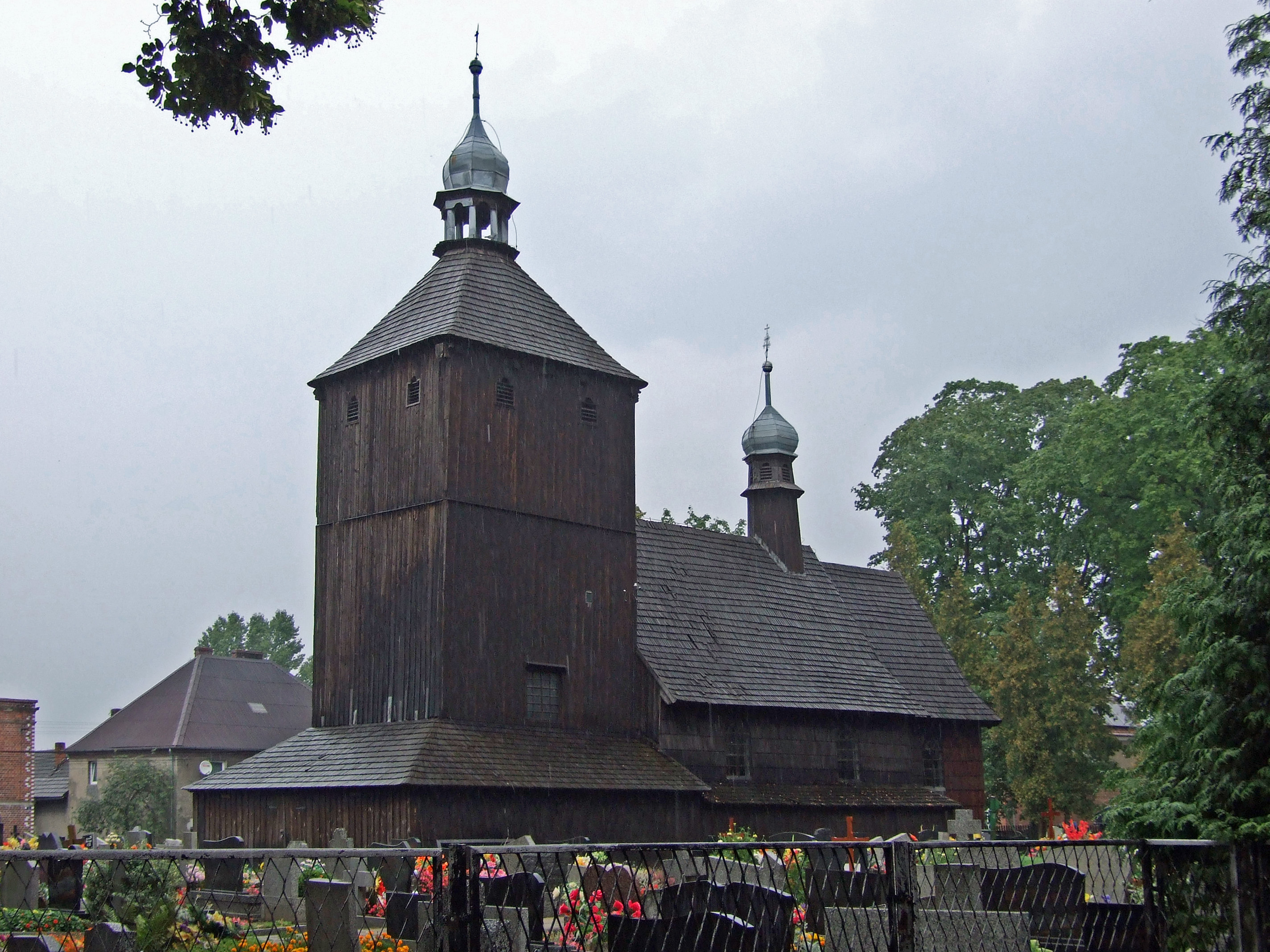 Kościół św. Marcina i Bartłomieja w Borkach Wielkich z 1697r.